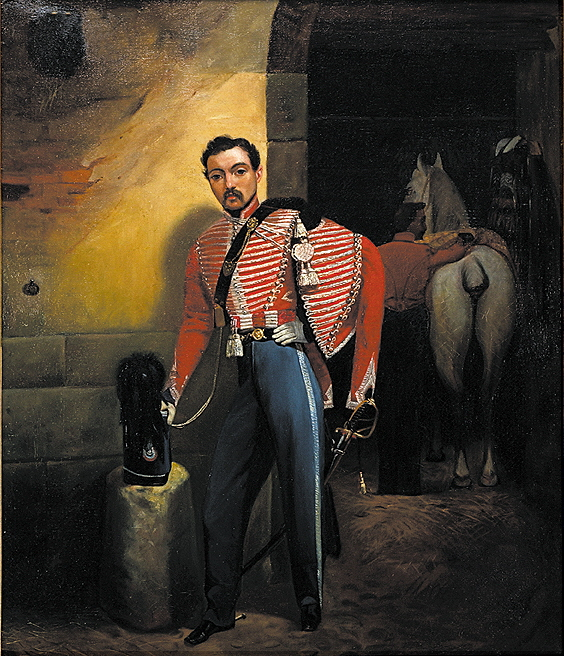 peinture anonyme : lieutenant des hussards avec pelisse, dolman, shako, daté 1838-1840.